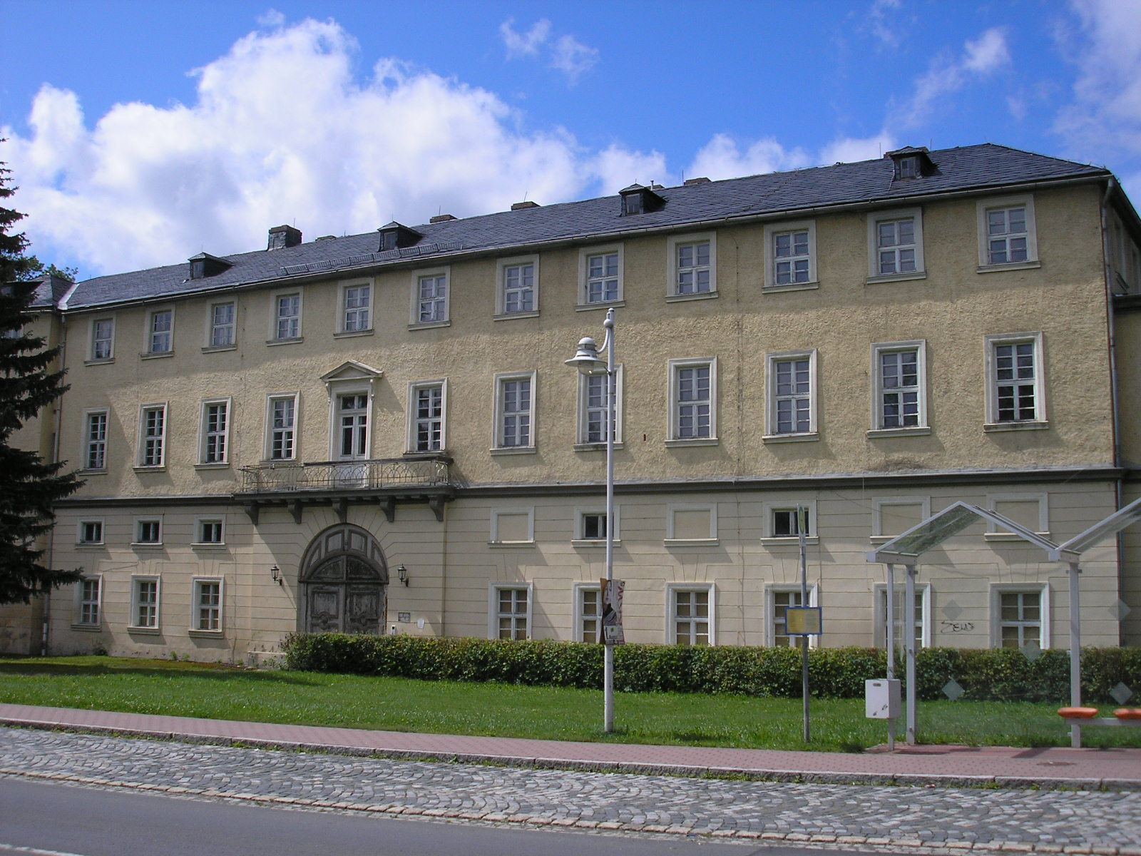 Straßenansicht von Schloss Ebersdorf (Thüringen).